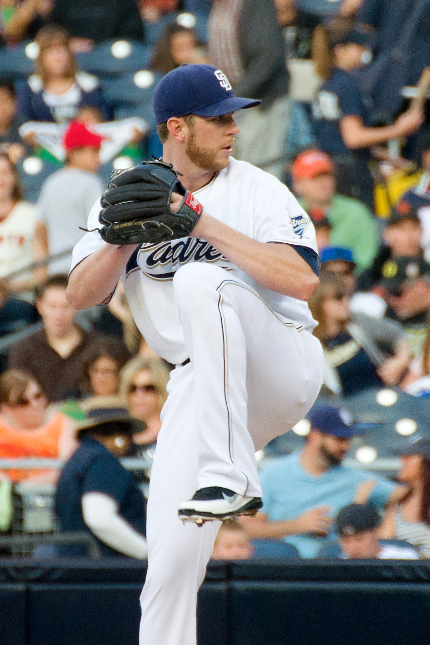 Dustin Moseley